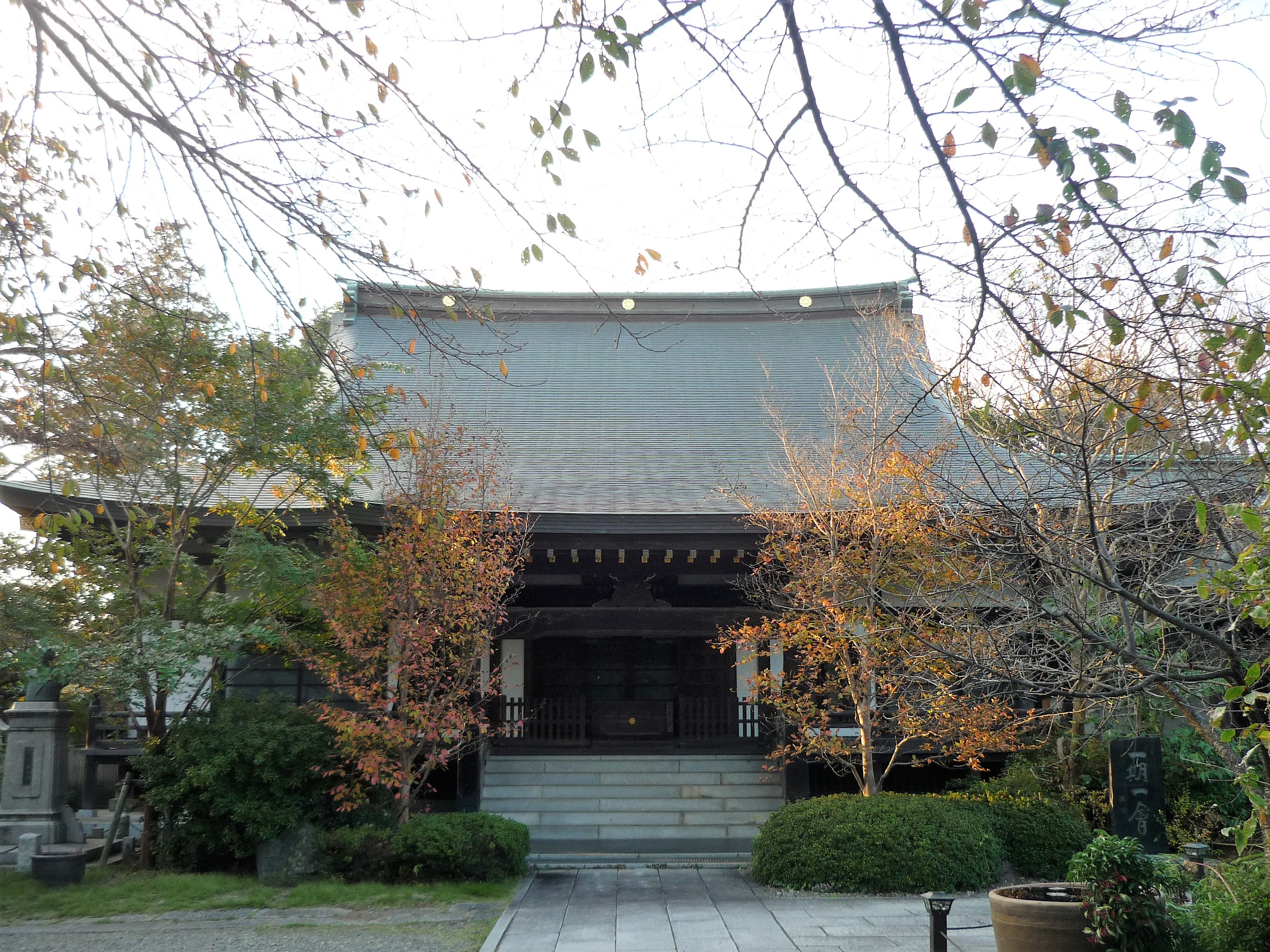 長禅寺（取手市取手）本堂 Panasonic Lumix DMC-FS3